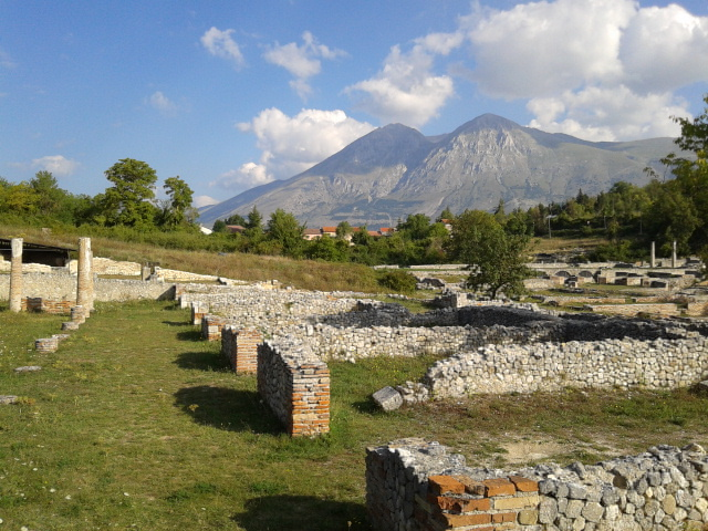 Scorcio fotografico di Alba Fucens